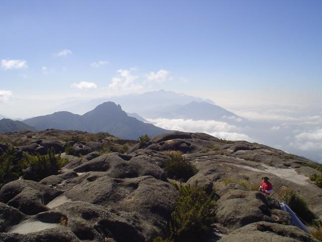 Vista do Pico dos Marins, na Serra da Mantiqueira, estado de São Paulo, Brasil